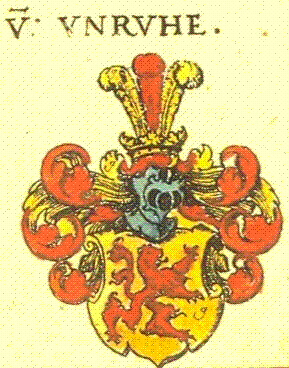 Wappen der Sächsischen Adelsfamilie Unruh